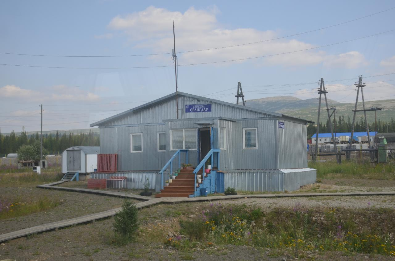 Поездка 5-6 августа 2019 г. по маршруту Якутск - Нерюнгри - Якутск во вновь назначенном поезде № 327 Нижний Бестях - Нерюнгри. Историческое событие - пуск пассажирского движения поездов из центральной Якутии, почти из Якутска.Железнодорожный разъезд Селигдар